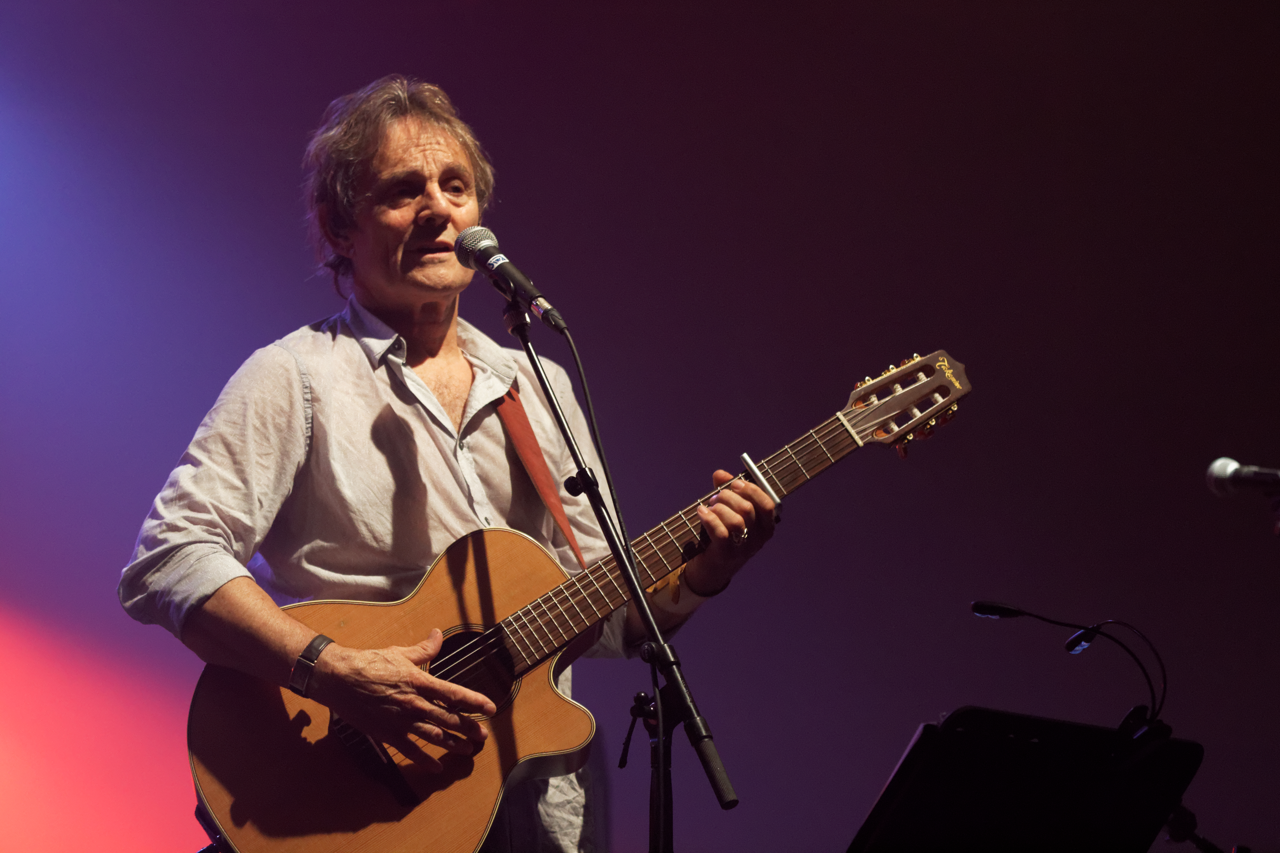 Murray Head en concert à l'espace Gradlon lors du festival de Cornouaille 2013.